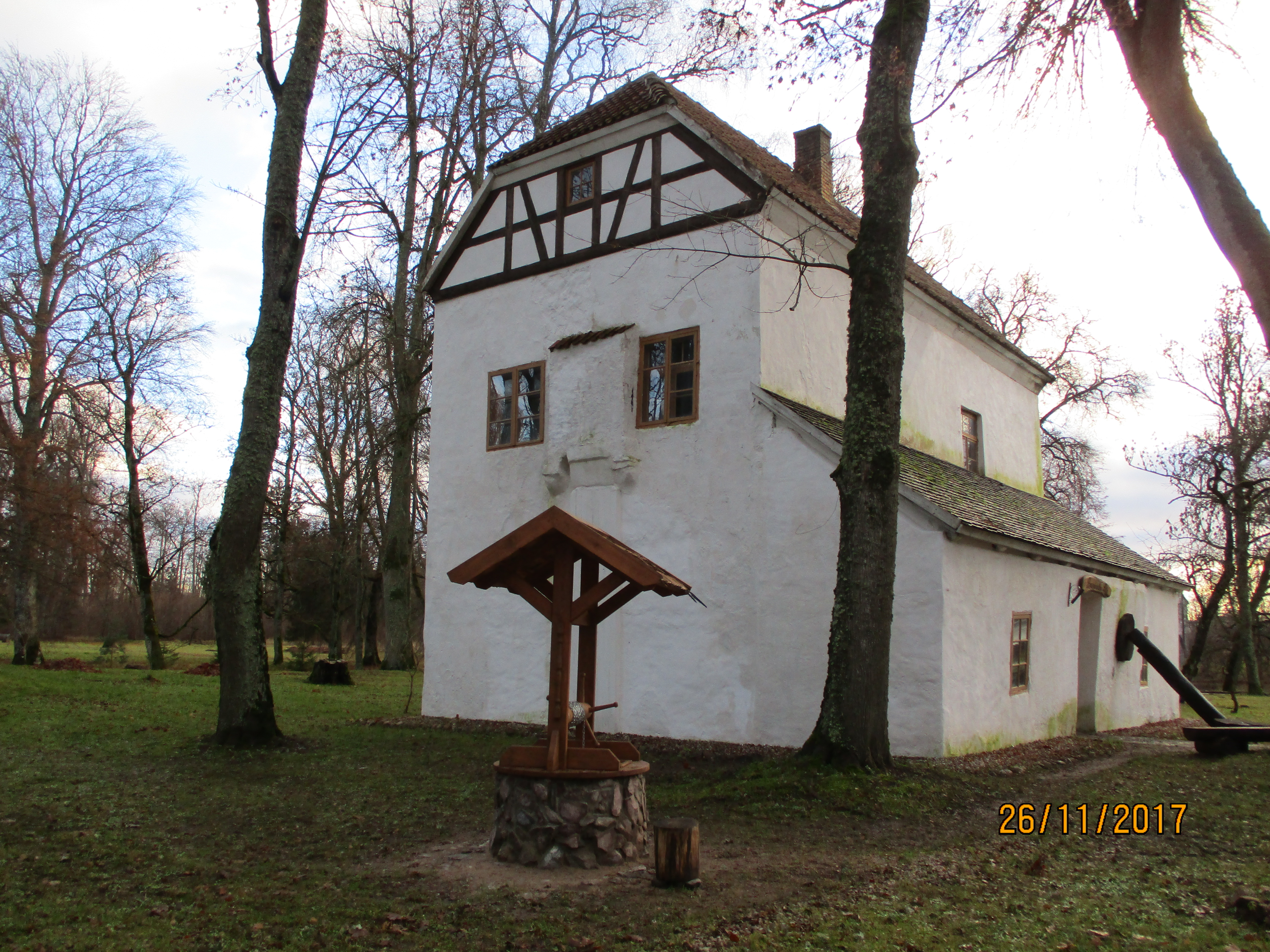 Linnuse põhjanurk